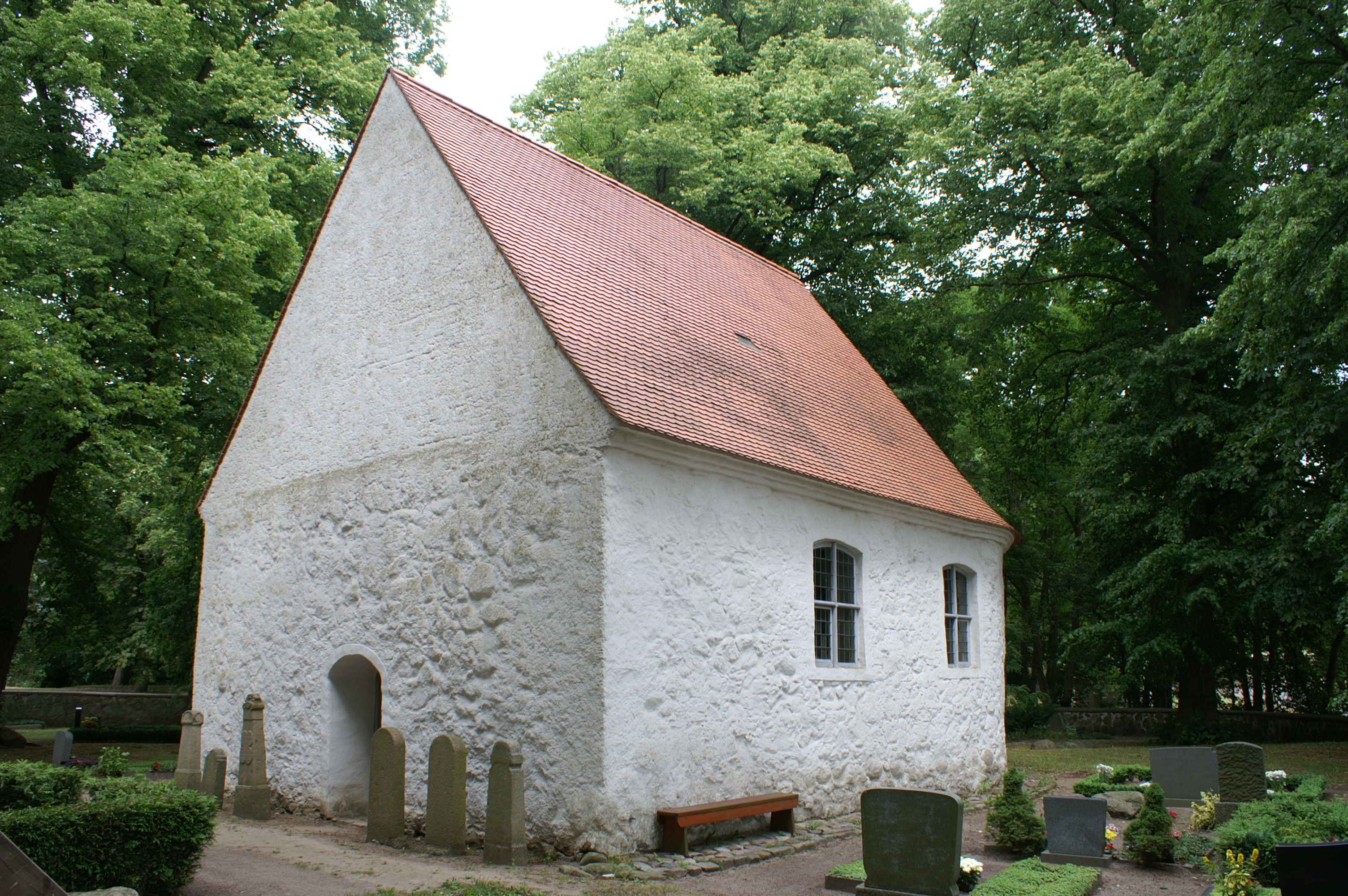 Kirche in Leistenow, Ansicht von Südwesten